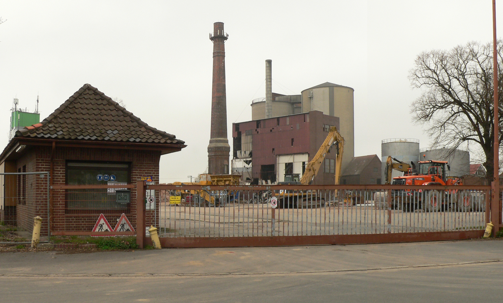 Abriss der Zuckerfabrik Weetzen